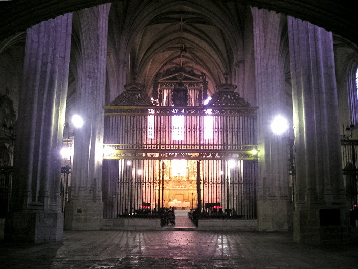 Interior de San Benito el Real, siglo XVI, Valladolid, España